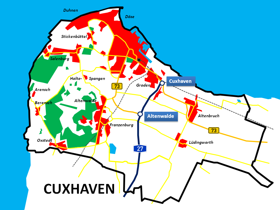 Verkehrskarte mit Ortsnamen - Cuxhaven, Niedersachsen, Deutschland